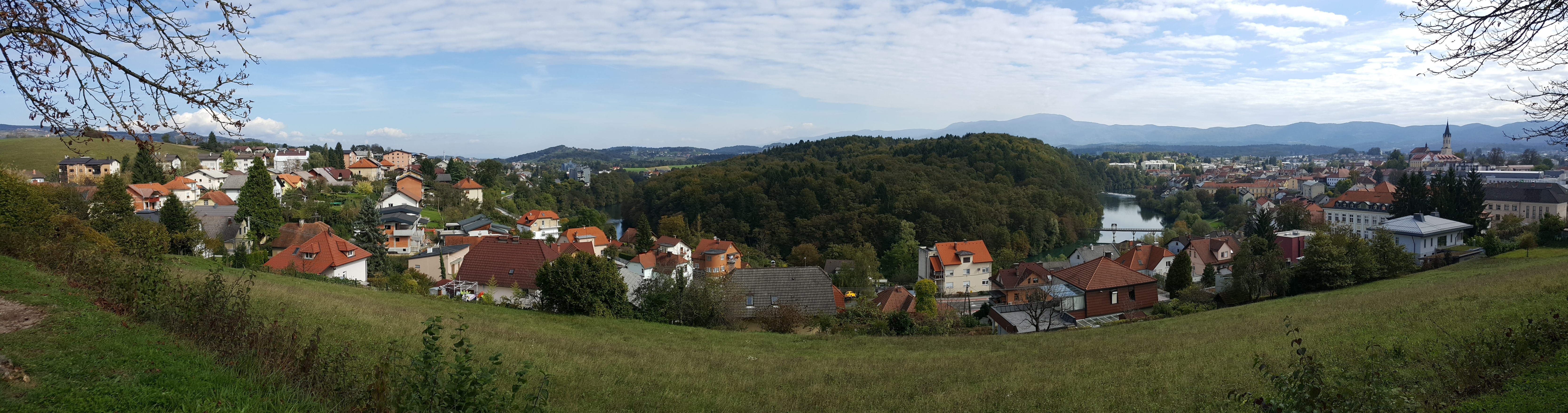 Panoramski pogled iz drevoreda